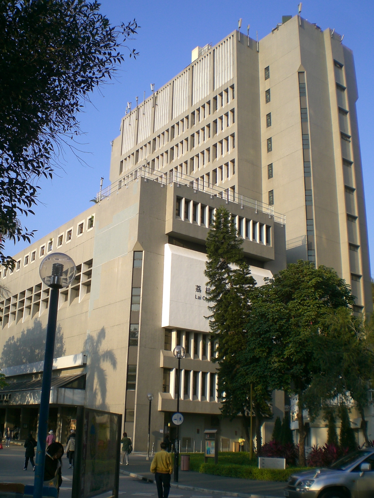 荔枝角政府合署